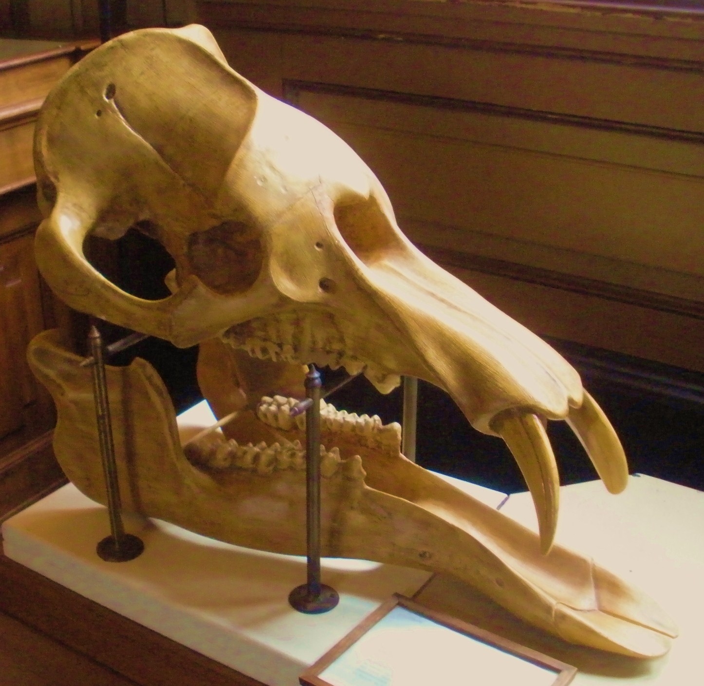 Fossil of Palaeomastodon, an extinct elephant - Took the photo at Teylers Museum, Haarlem